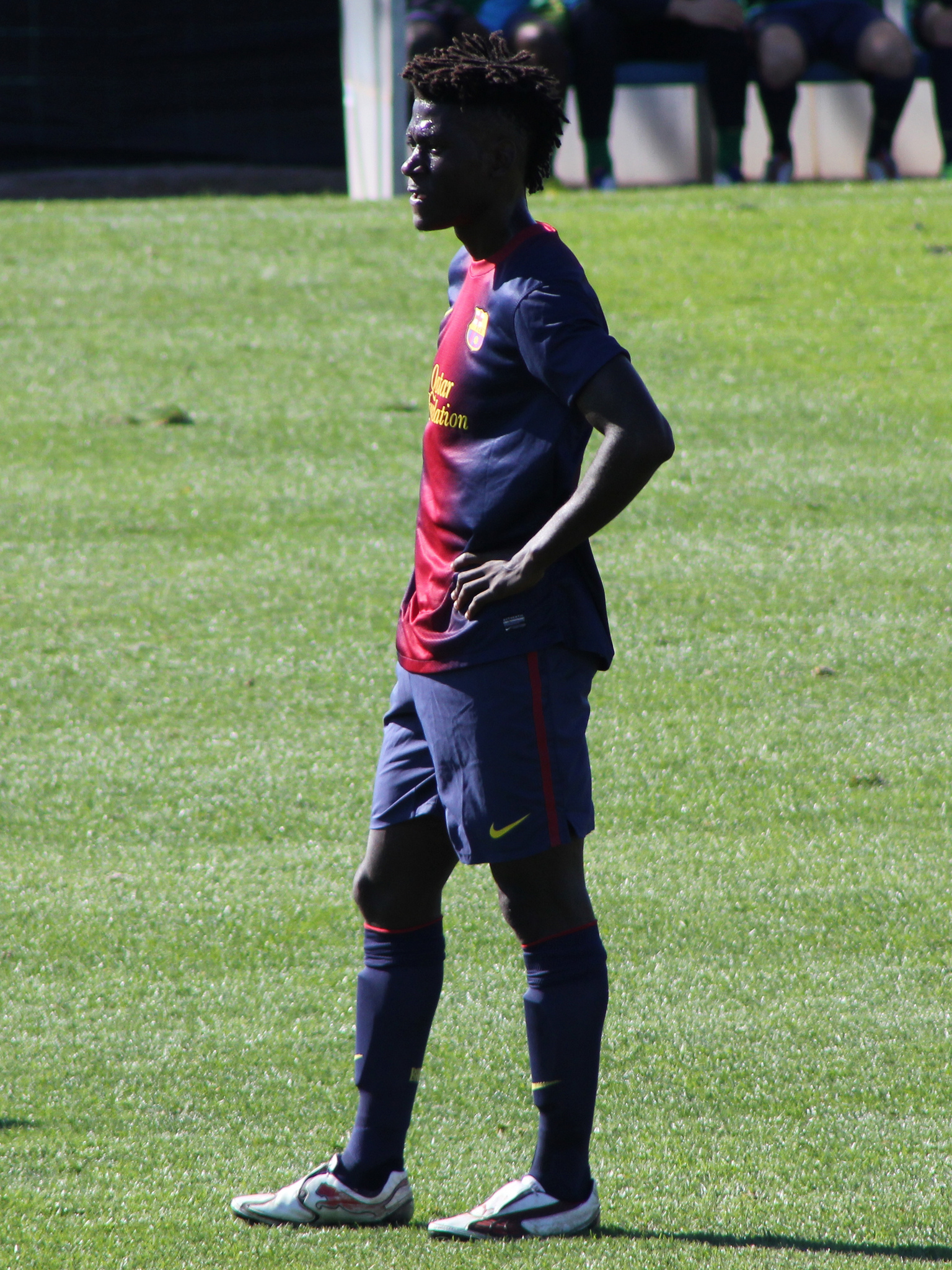 Foto realizada por Javier Segura (@castroquini)